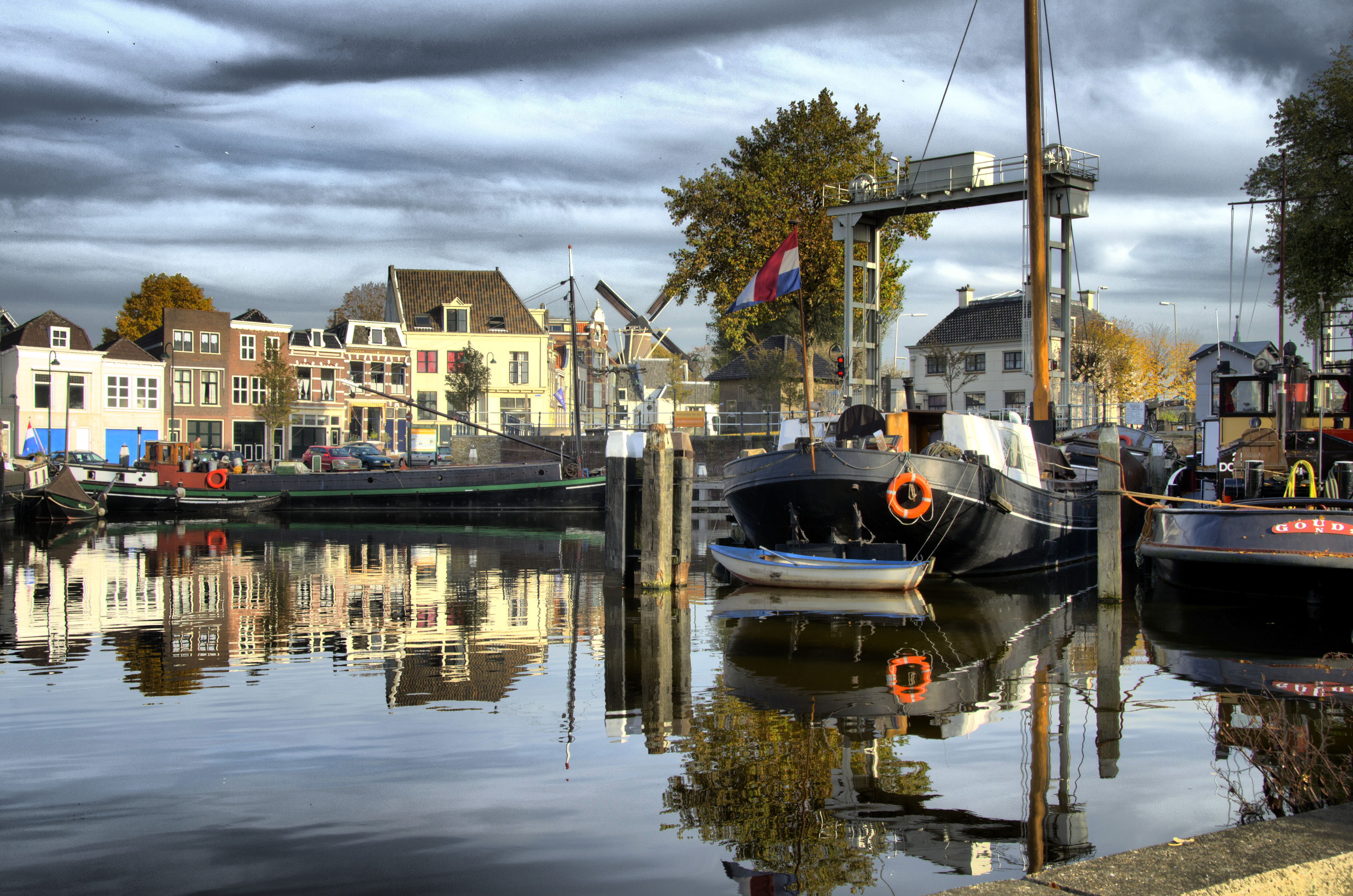 Gouda, Haven